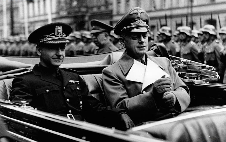 Ramón Serrano Suñer y Joachim von Ribbentrop, en Berlín (1940).